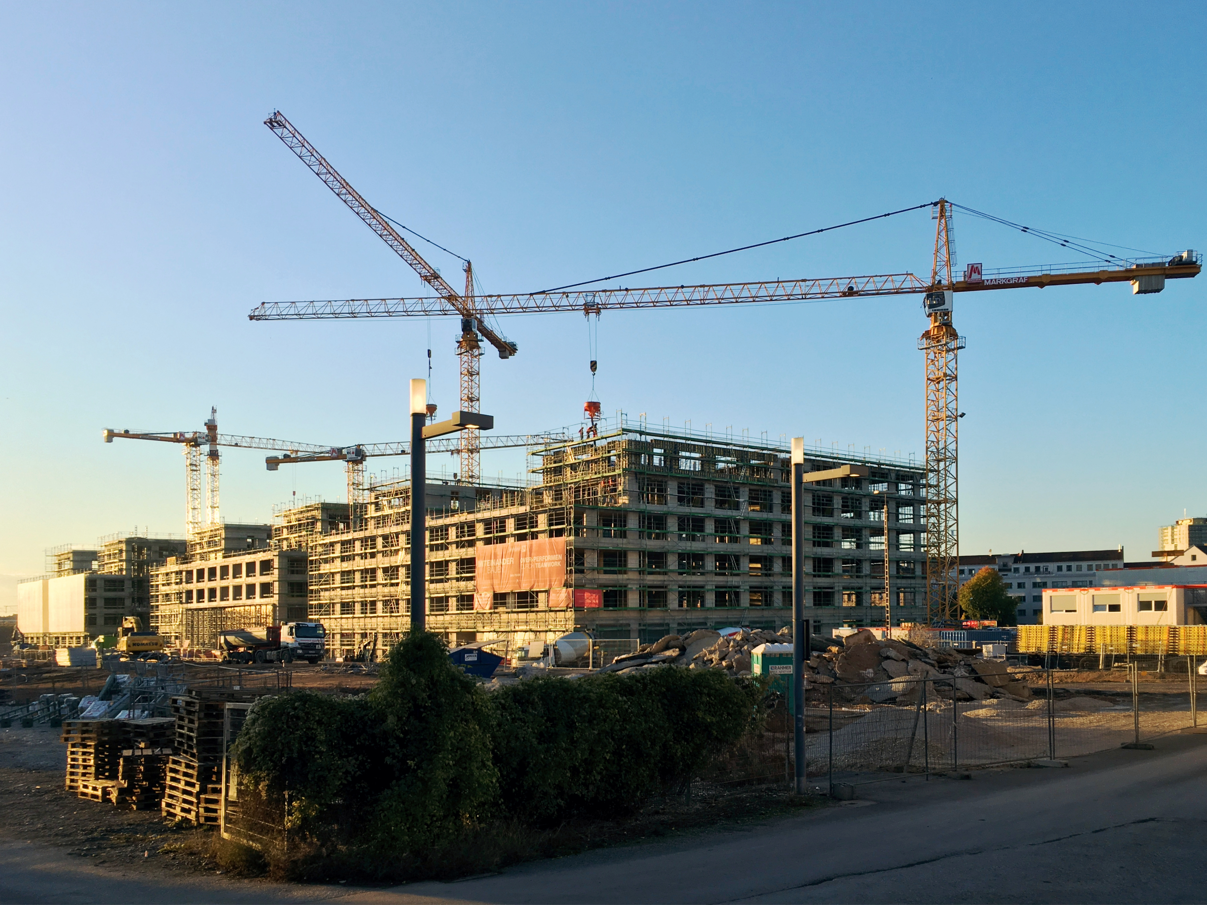 Nürnberg Hauptgüterbahnhof 2018